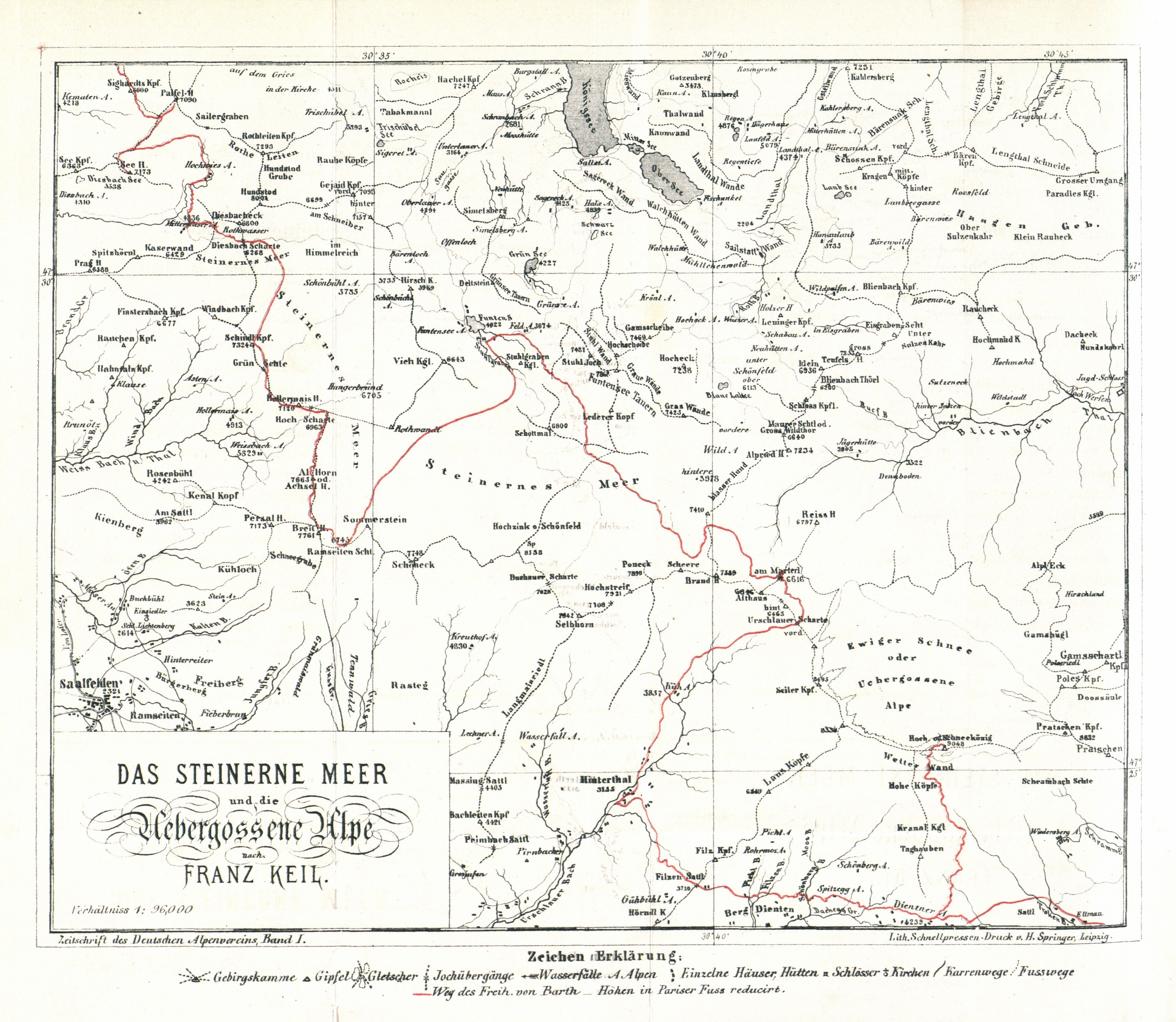 Das Steinerne Meer und die Übergossene Alpe aus Zeitschrift des Deutschen Alpenvereins 1870 Band I. Vereinsjahr 1869-1870 Seite 335